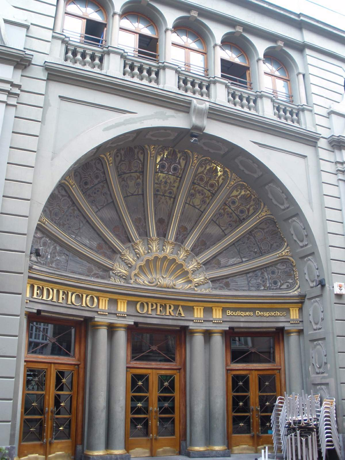 Edificio Ópera (Vitoria-Gasteiz)